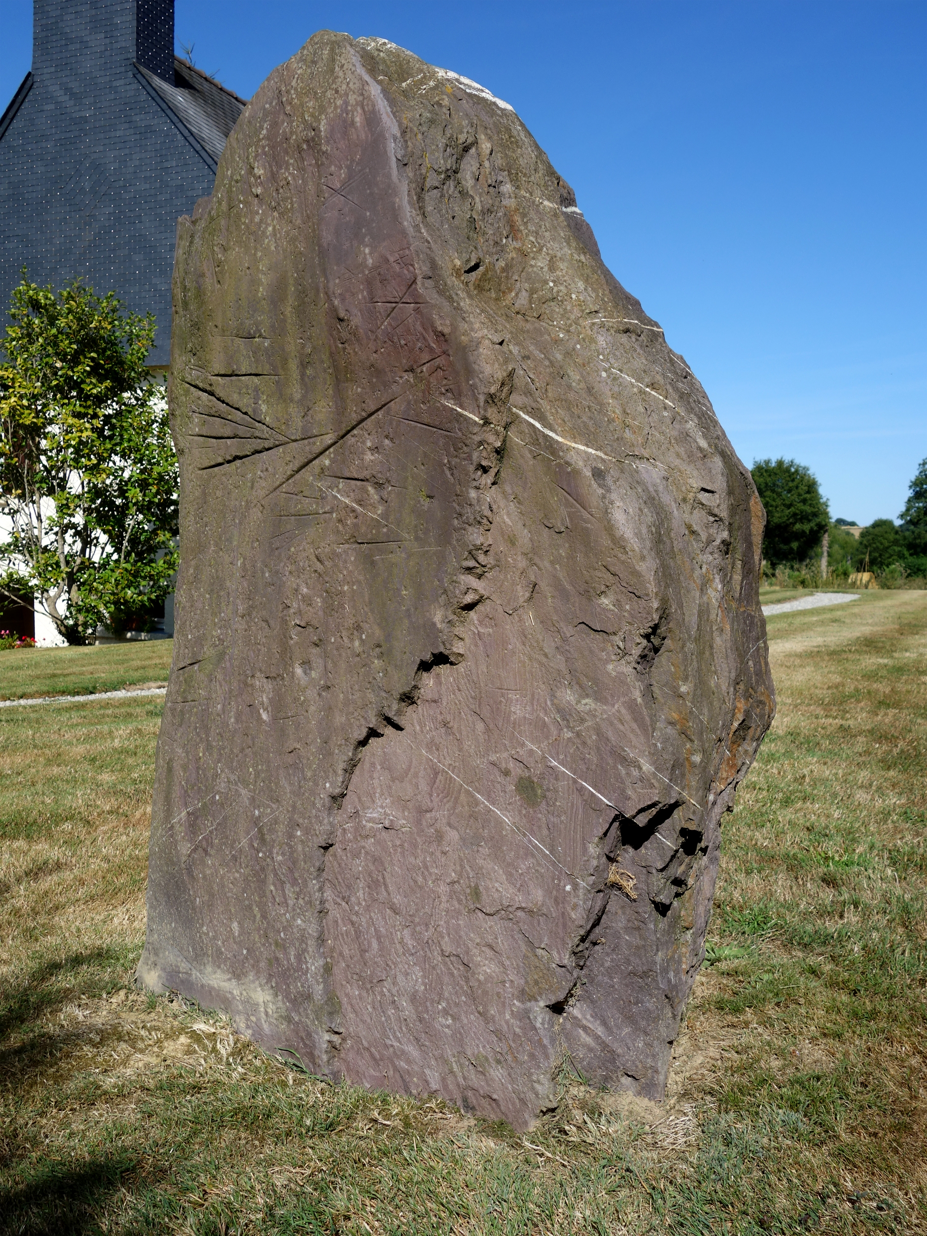 L'un des menhirs les plus étonnants de Bretagne : le polissoir de Trézon près de Monteneuf… Ce menhir est vraiment surprenant car il présente de nombreuses entailles d'origine humaine nettement visibles sur l'une de ses faces : il est donc considéré comme un polissoir. Entailles qui font écho aux autres enclaves de quartz naturel visibles sur ses deux faces.